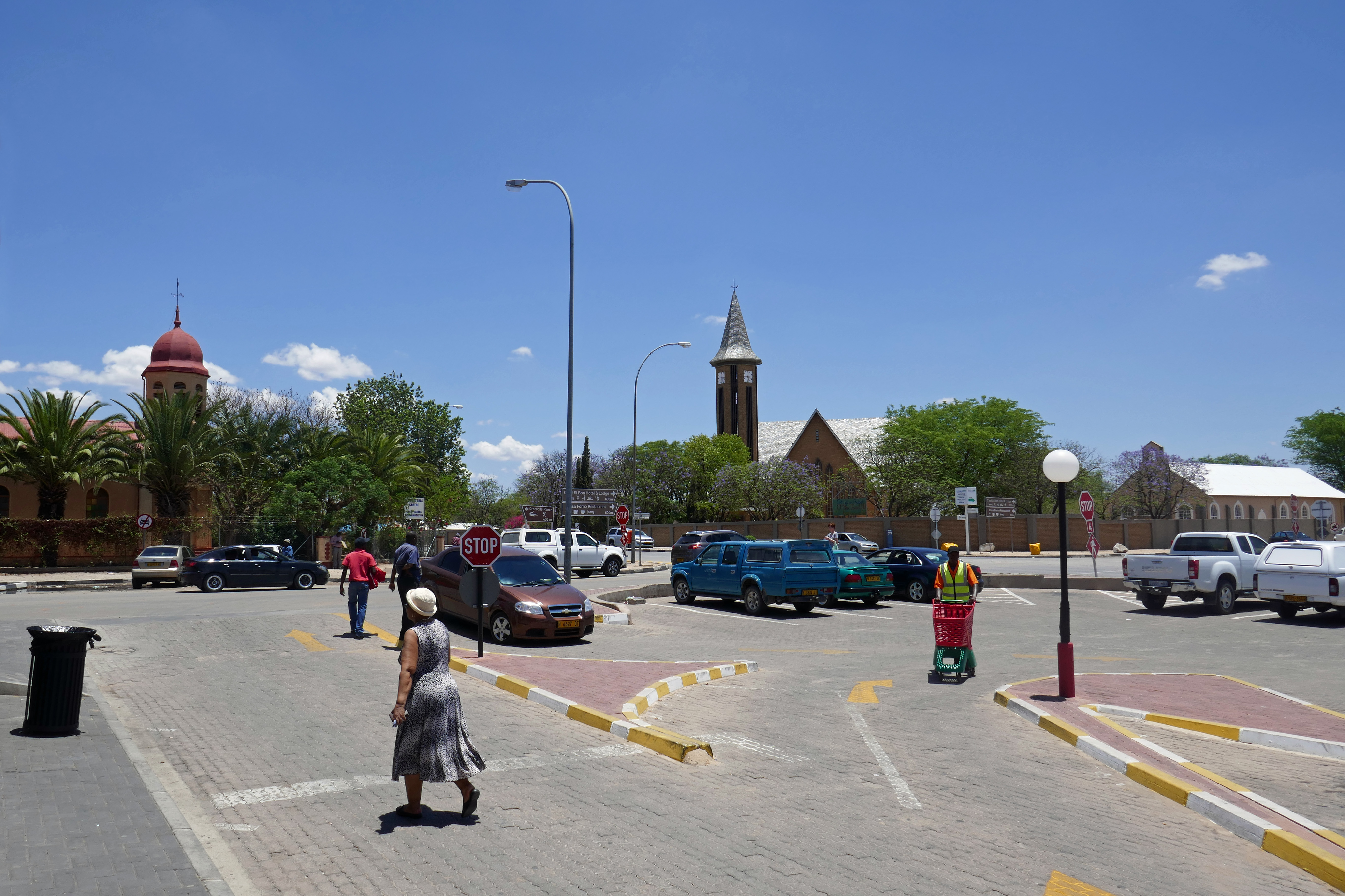 Otjiwarongo (Namibie).